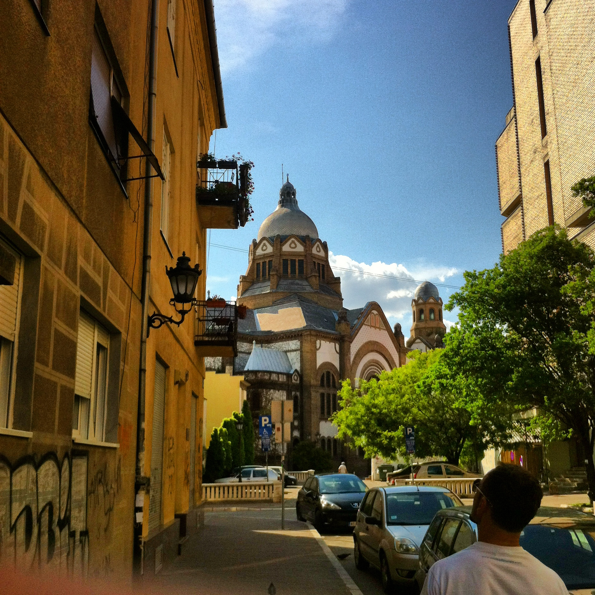 Српски (ћирилица): Једна је од четири синагоге у Србији. Саграђена је у периоду од 1906-9.године.